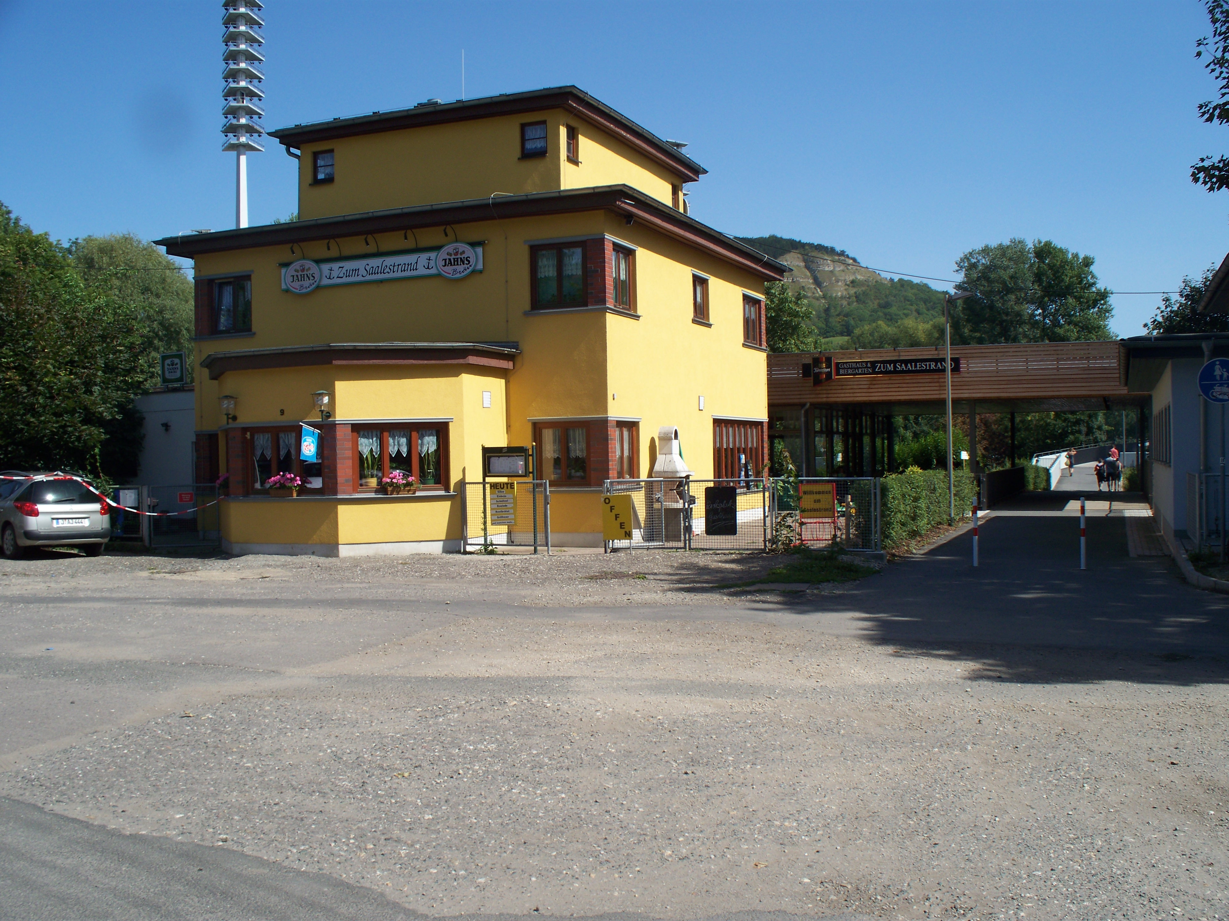 Gaststätte mit Biergarten "Zum Saalestrand"